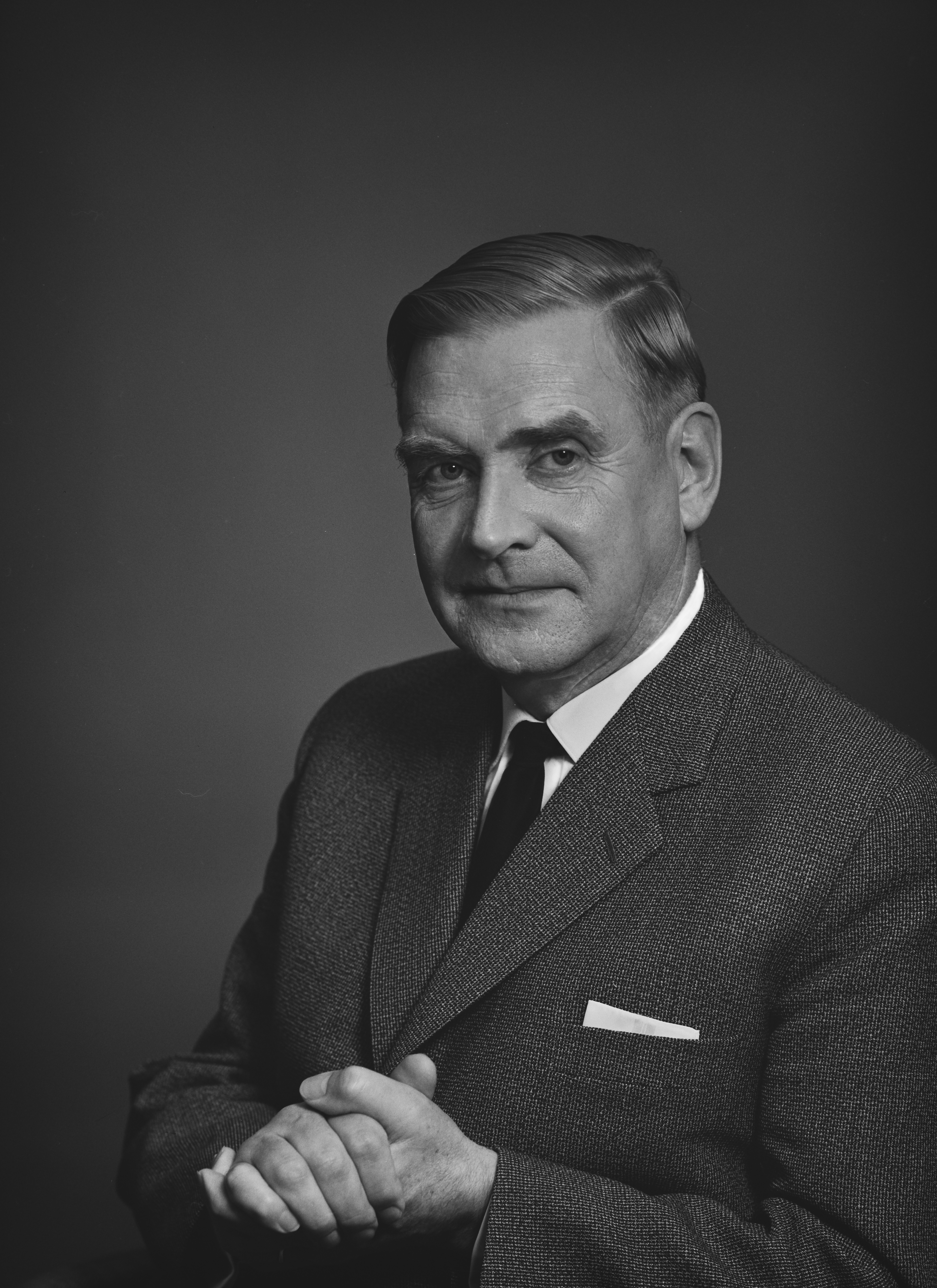 Ruben Erik Nirvi (vuoteen 1928 Snirvi; 16. joulukuuta 1905 Askola – 26. tammikuuta 1986 Helsinki) oli suomalainen kielitieteilijä